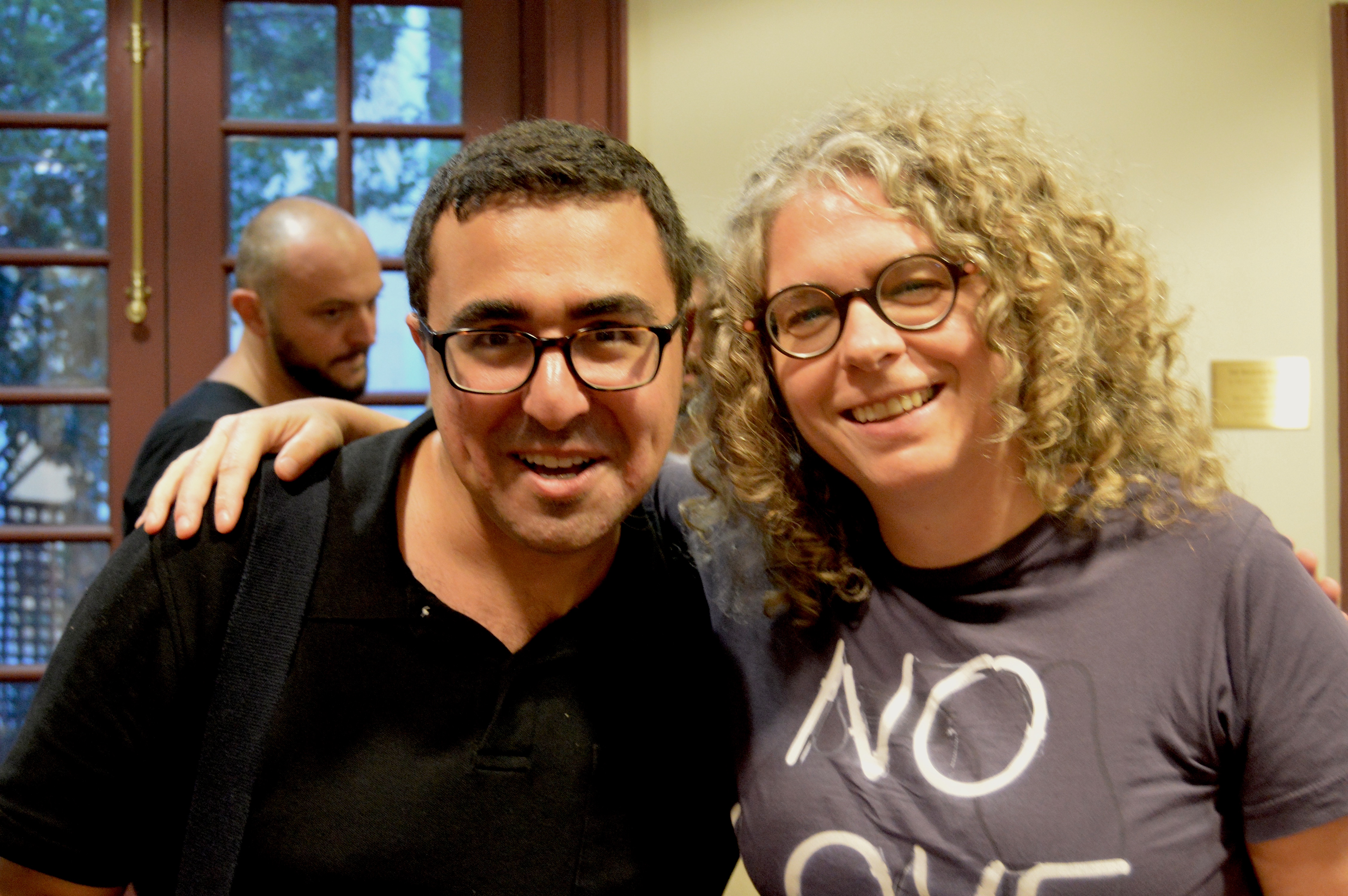 Poet Rachel Zolf (right)